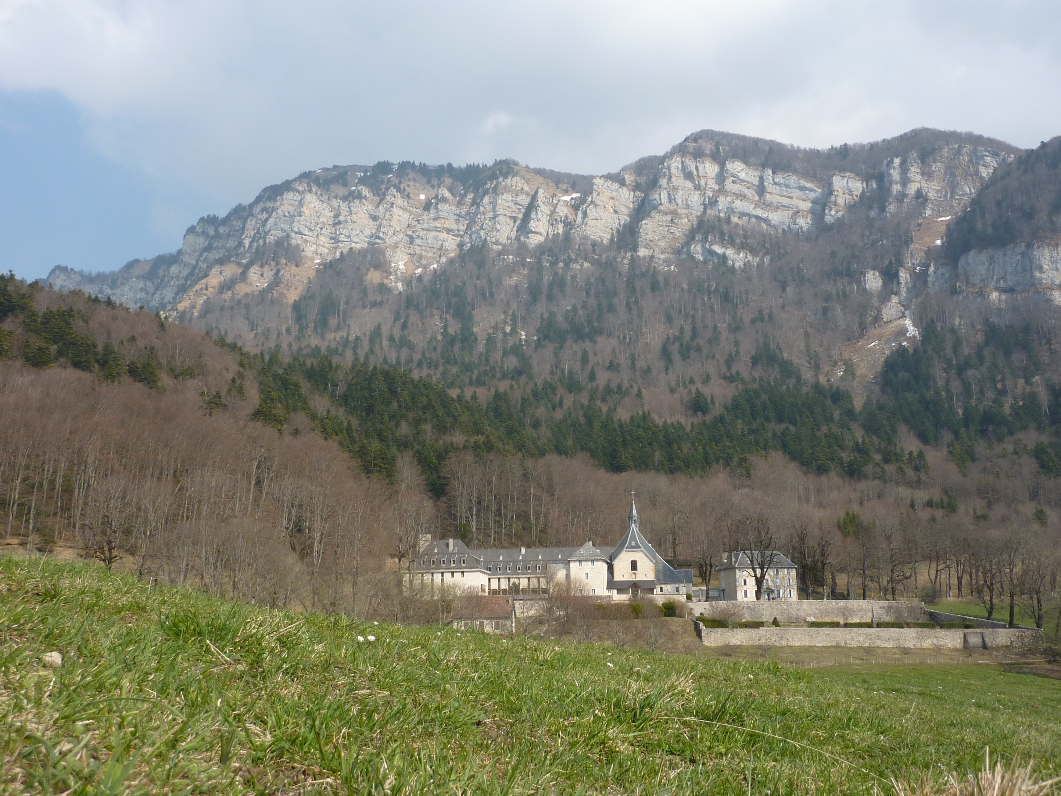 Abbaye de Chalais au printemps, Voreppe, Isère, France